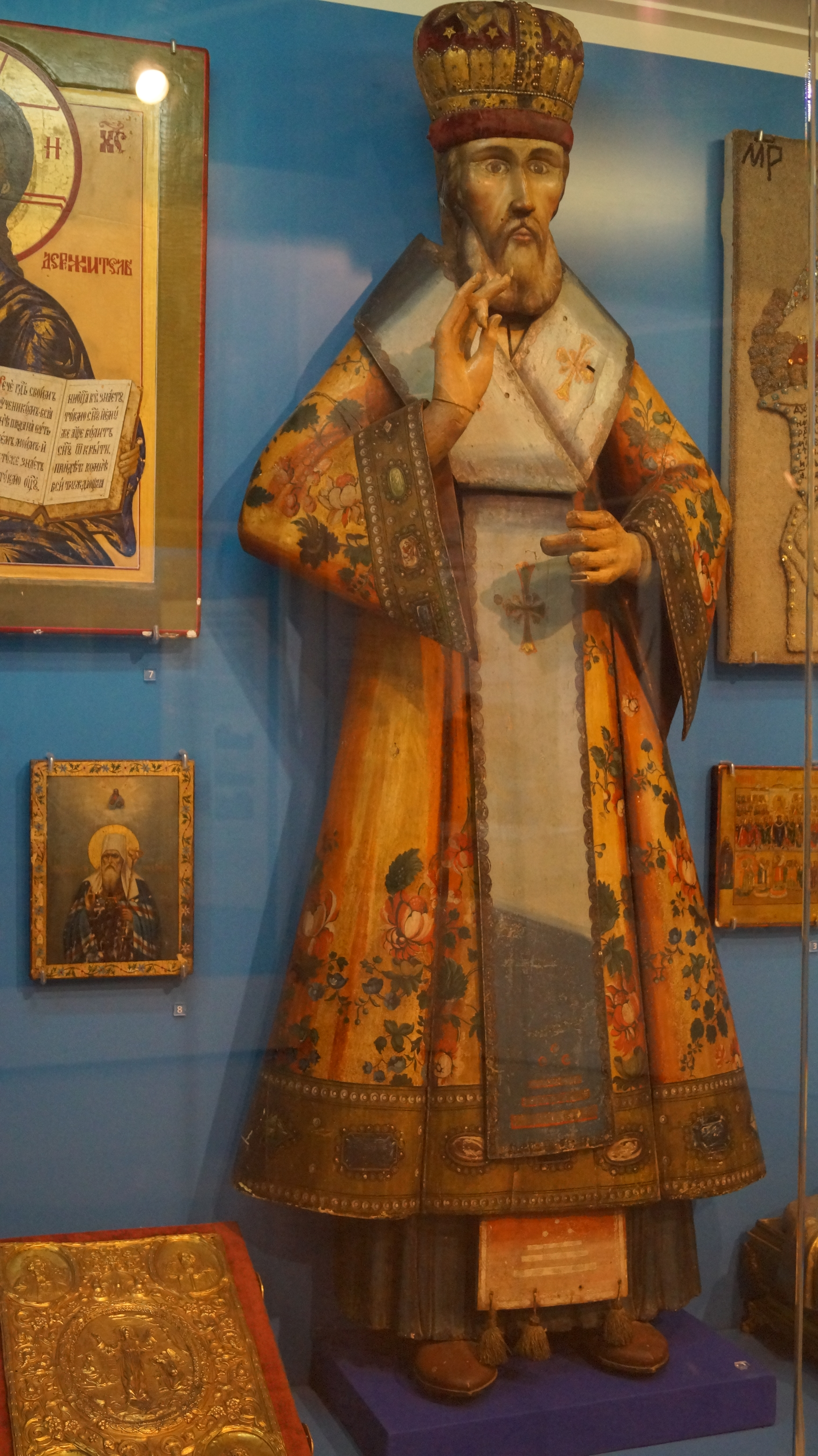 Деревянная статуя Святого Николая Мерлинского (Чудотворца) в Челябинске